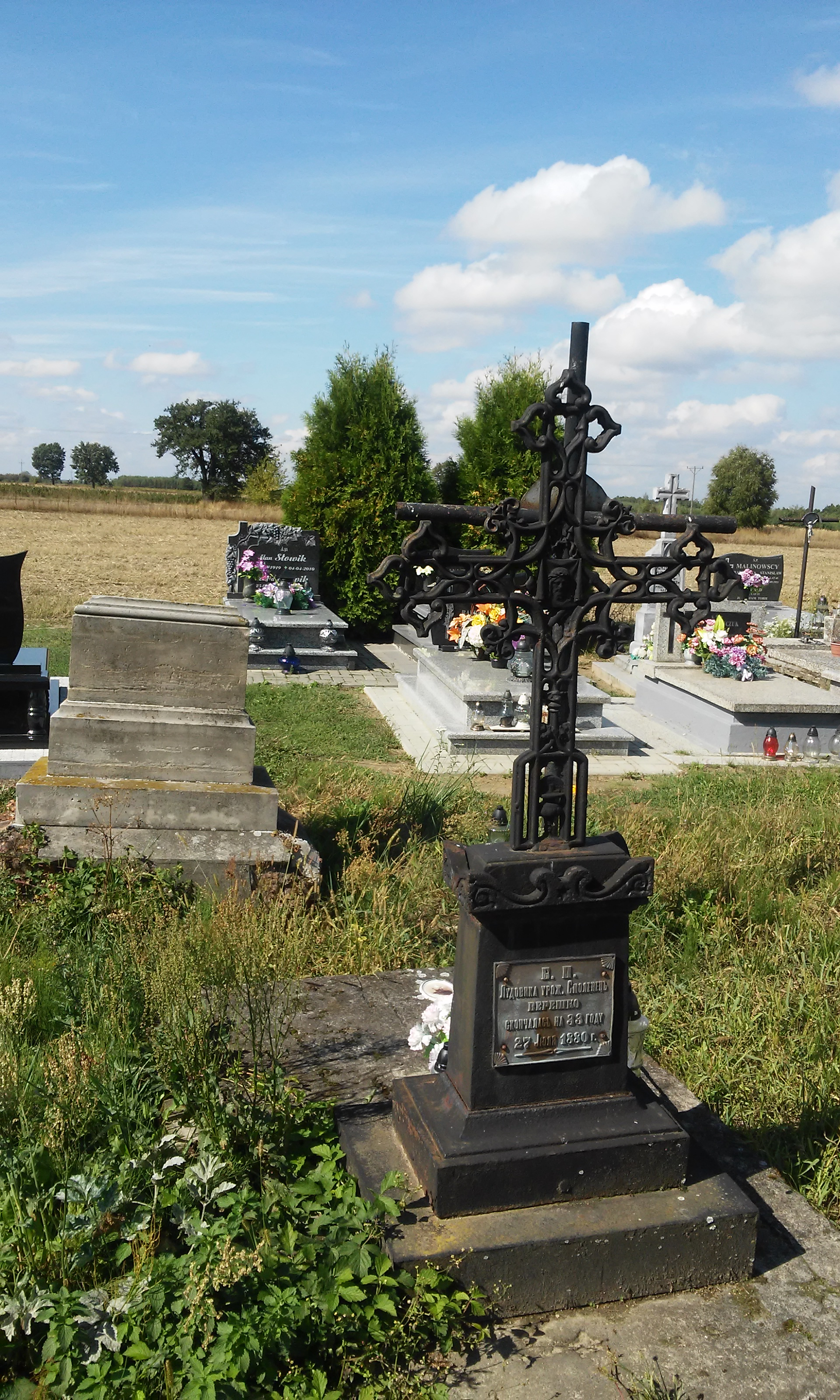 Jedne z ostatnich zachowanych na cmentarzu w Kaniach, pierwotnie dwuwyznaniowym, nagrobków prawosławnych. Od pierwszego planu krzyż na grobie Ludwiki Wereszko (zm. 1880), tablica Kłyma Wereszki i kamienny nagrobek ks. Platona Wereszki (zm. 1919)